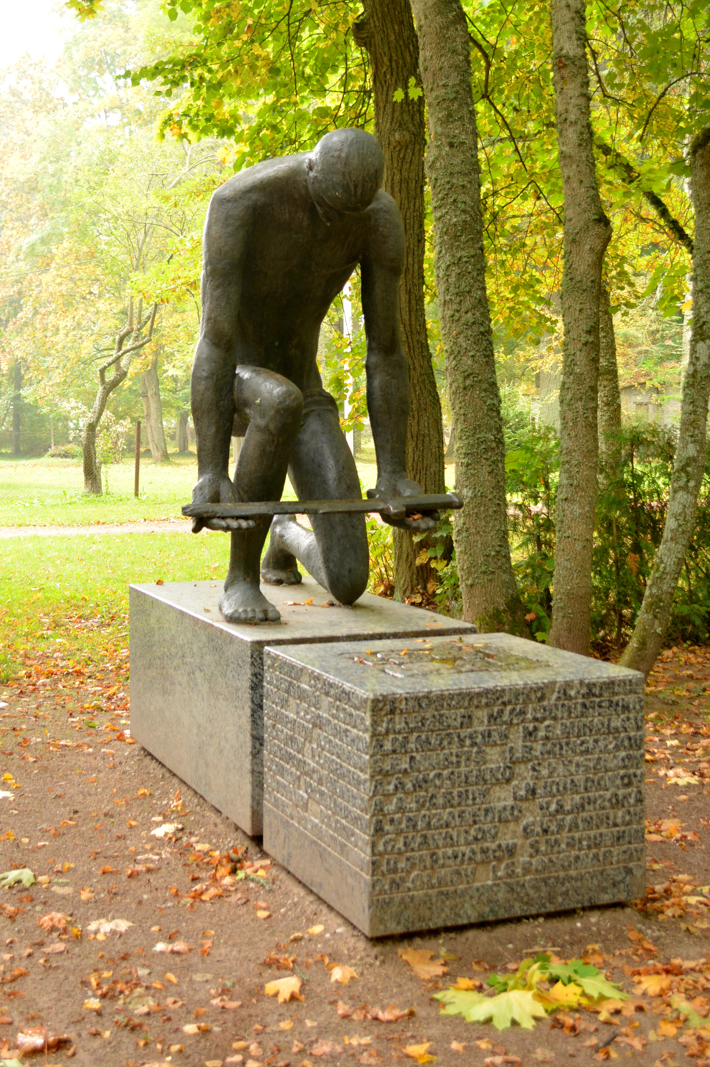 II maailmasõjas hukkunute ühishaud Ahjal